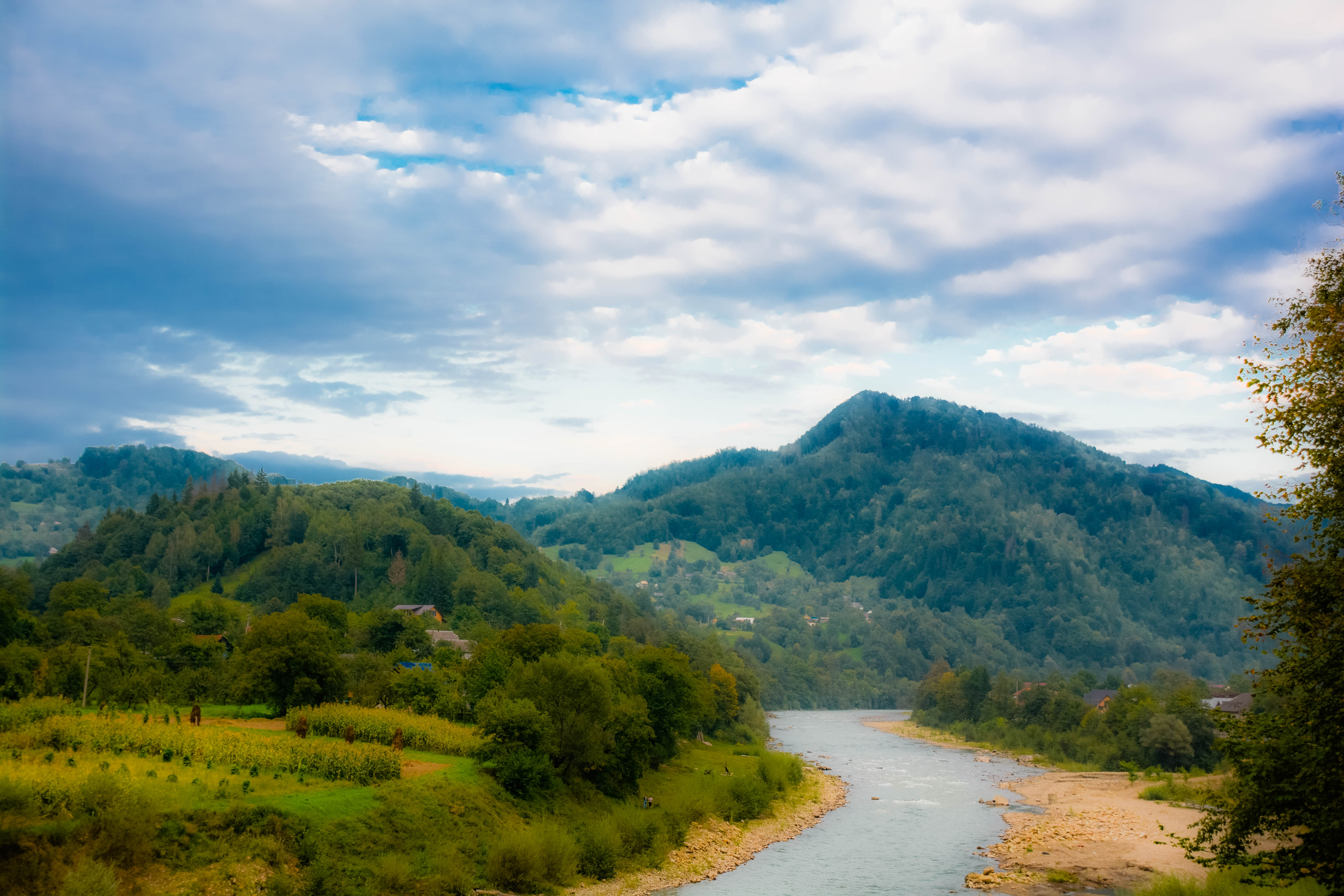 с. Тюдів, Івано-Франківська область, Косівський район